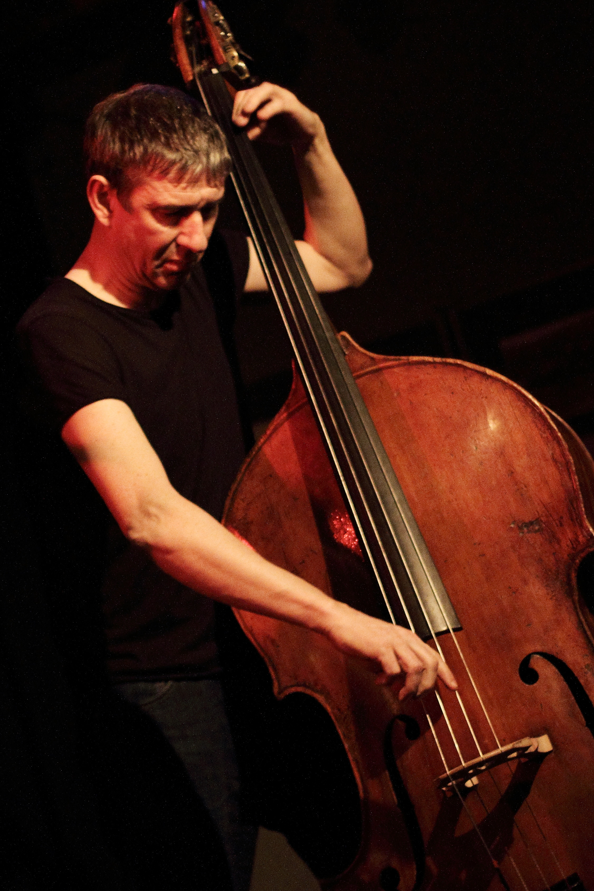 Der Schweizer Bassist Daniel Studer im Club W71, Weikersheim.